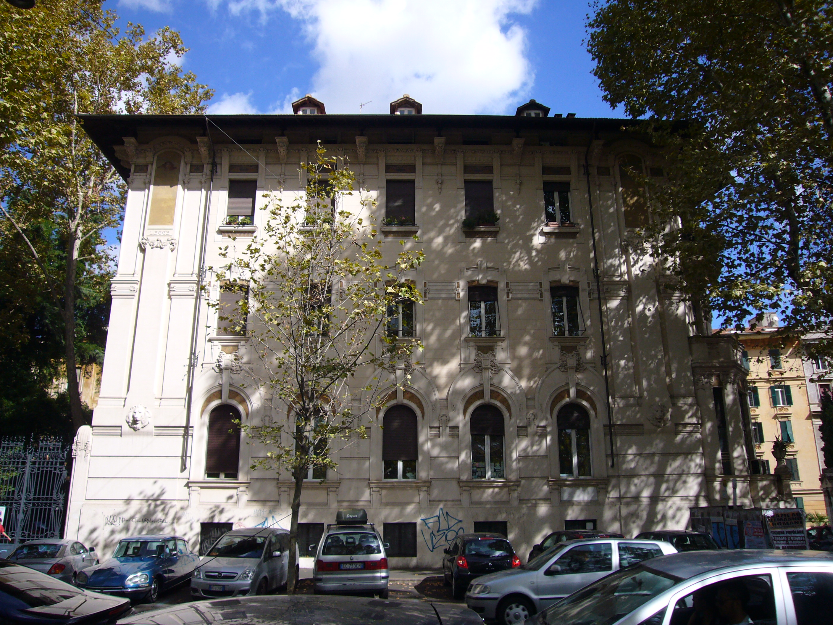 Roma, lungotevere de' Cenci: architettura eclettica